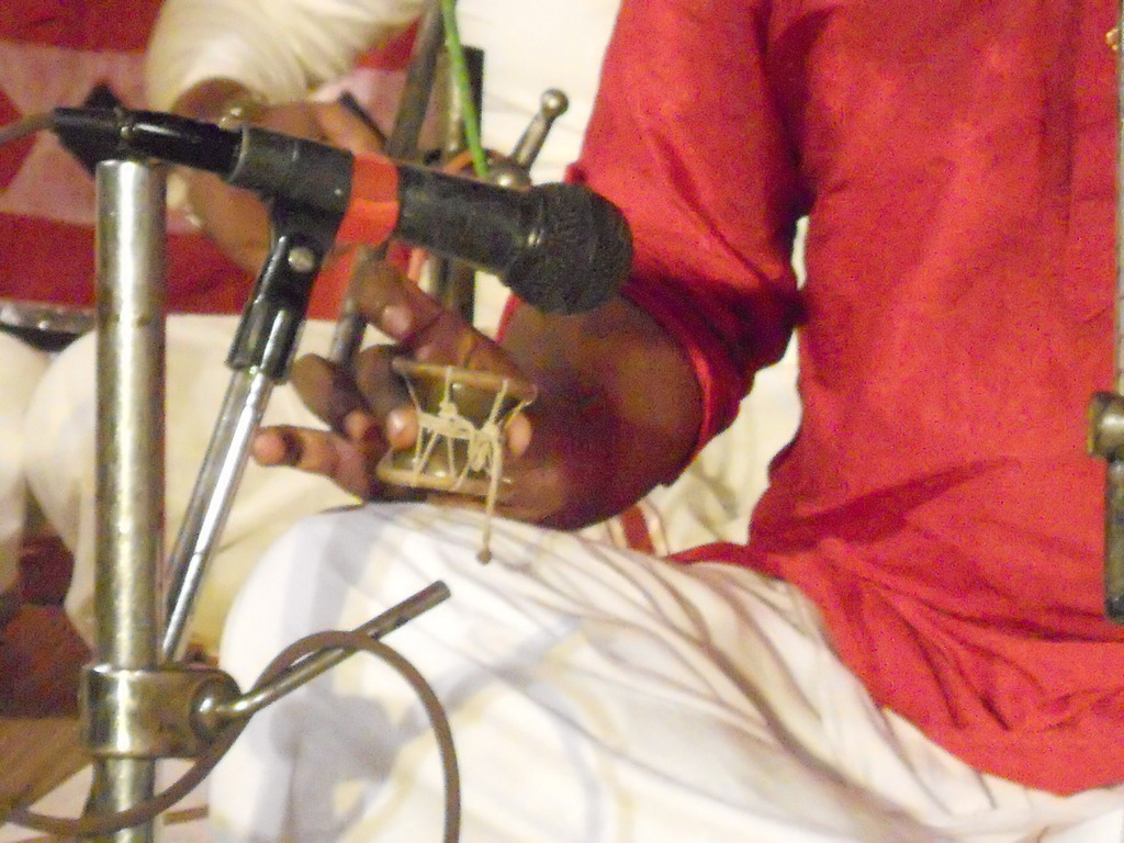 കോണാങ്കി ഉടുക്ക്